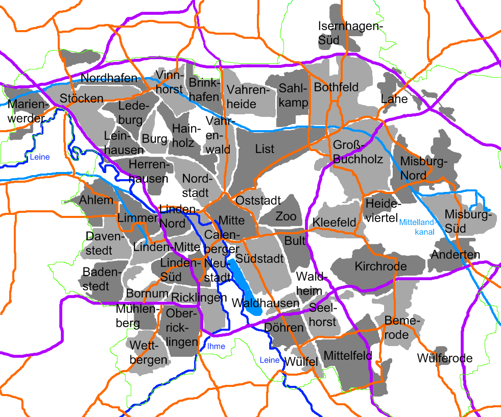 Hannover mit Stadtteilen